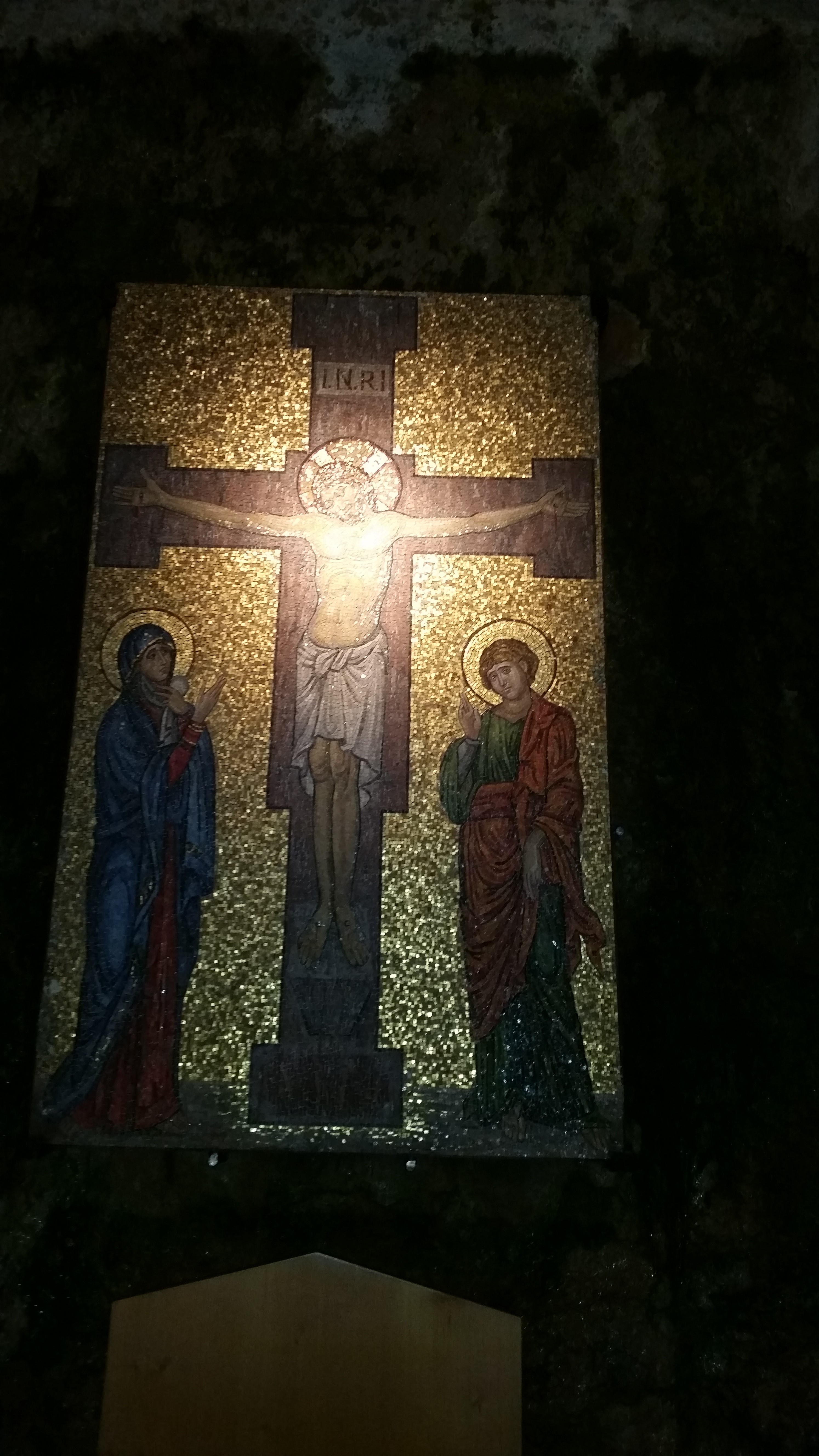 Rappresentazione della Santissima Trinità